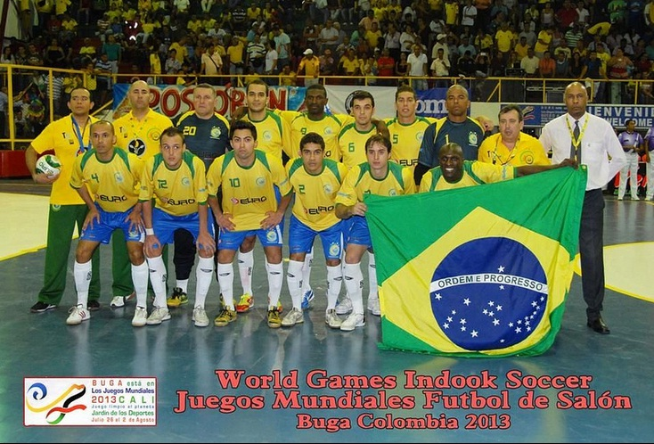 Foto da Seleção Brasileira de Futebol de Salão nos Jogos Mundiais de 2013